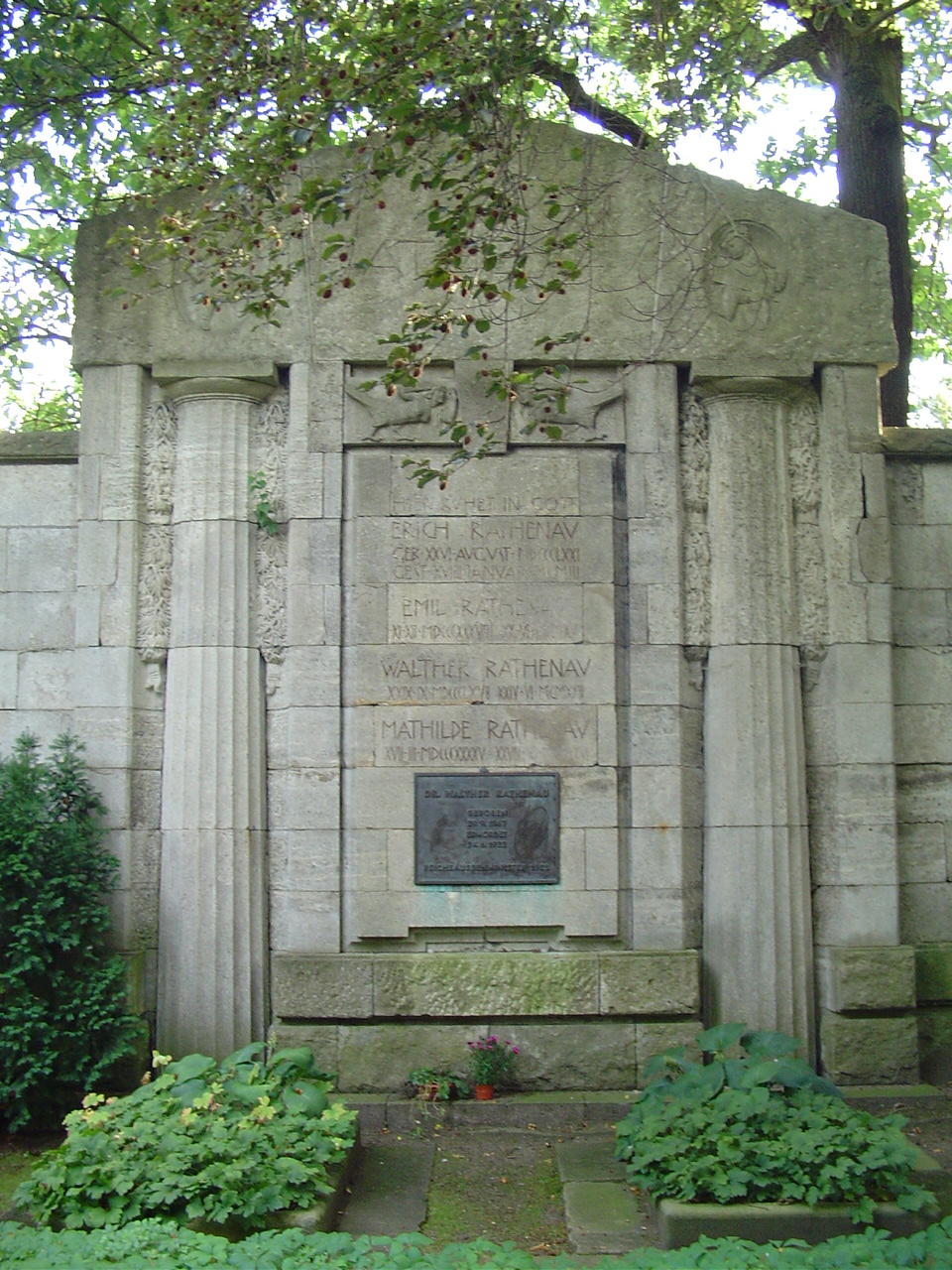 Waldfriedhof Oberschöneweide, Berlin, Grabstätte der Familie Rathenau